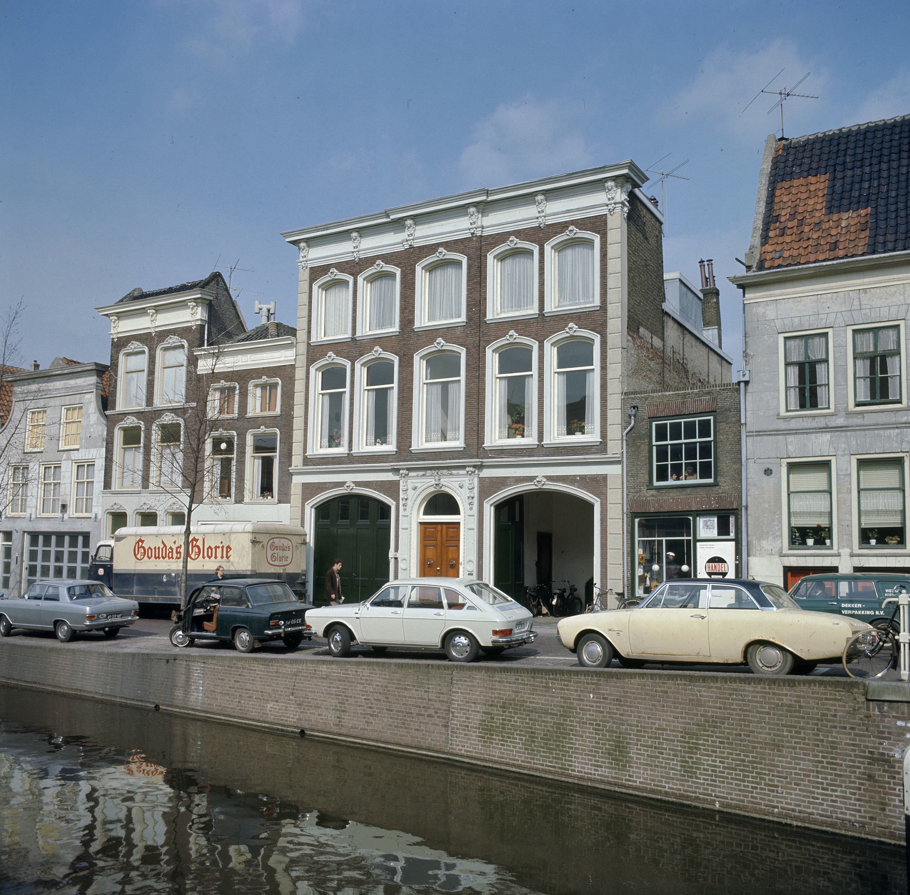 Overzicht van de voorgevels